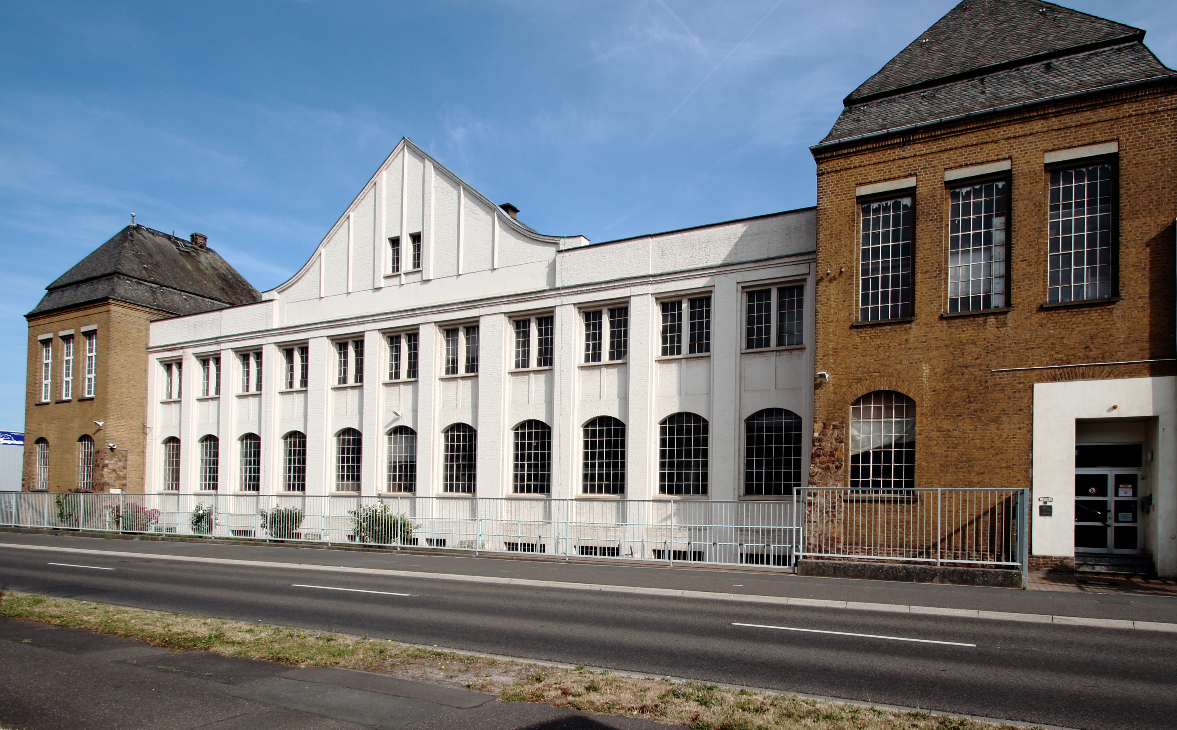 ie denkmalgeschützte Werkshalle in Geisenheim, Rheingau. Erbaut 1906. Zunächst im Besitz der Maschinenfabrik Johannisberg Klein, Forst & und Bohn Nachfolger zu Geisenheim a. Rh.. Bis 2006 Standort des Druckmaschinenherstellers MAN Roland AG.